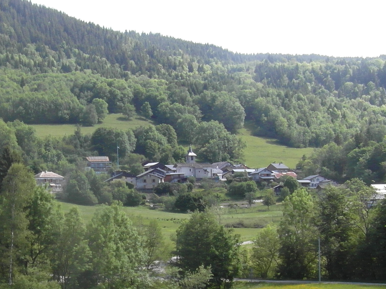 Le village de Champ-Laurent